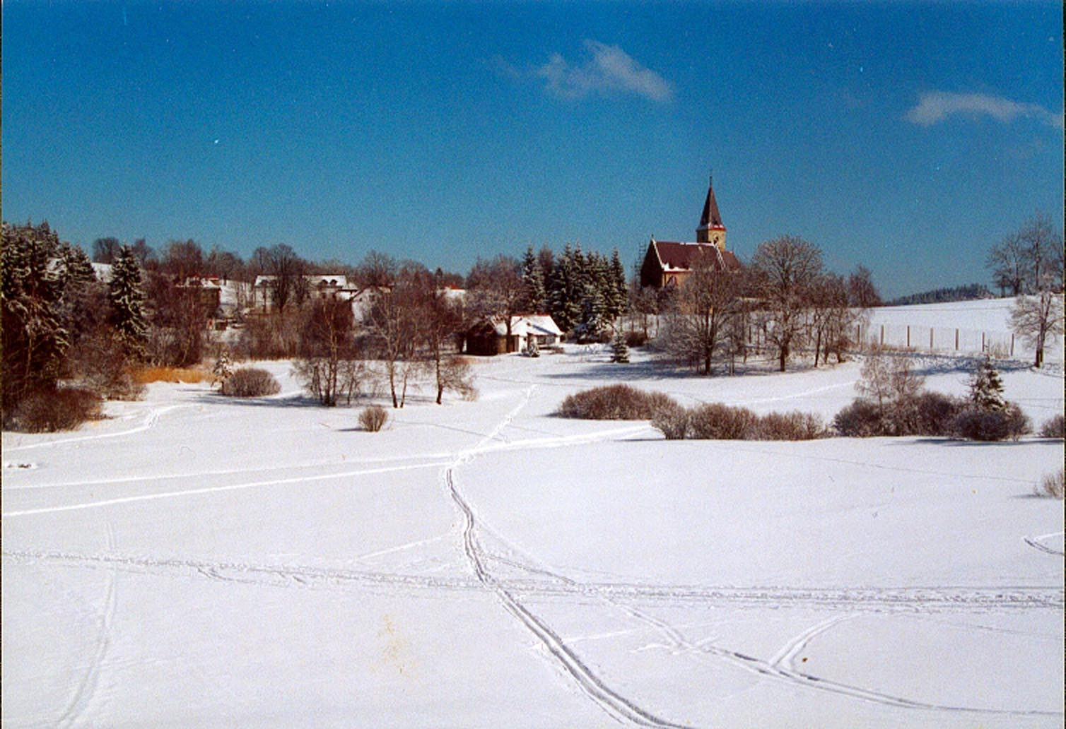 Horni Maxov kostel a udoli